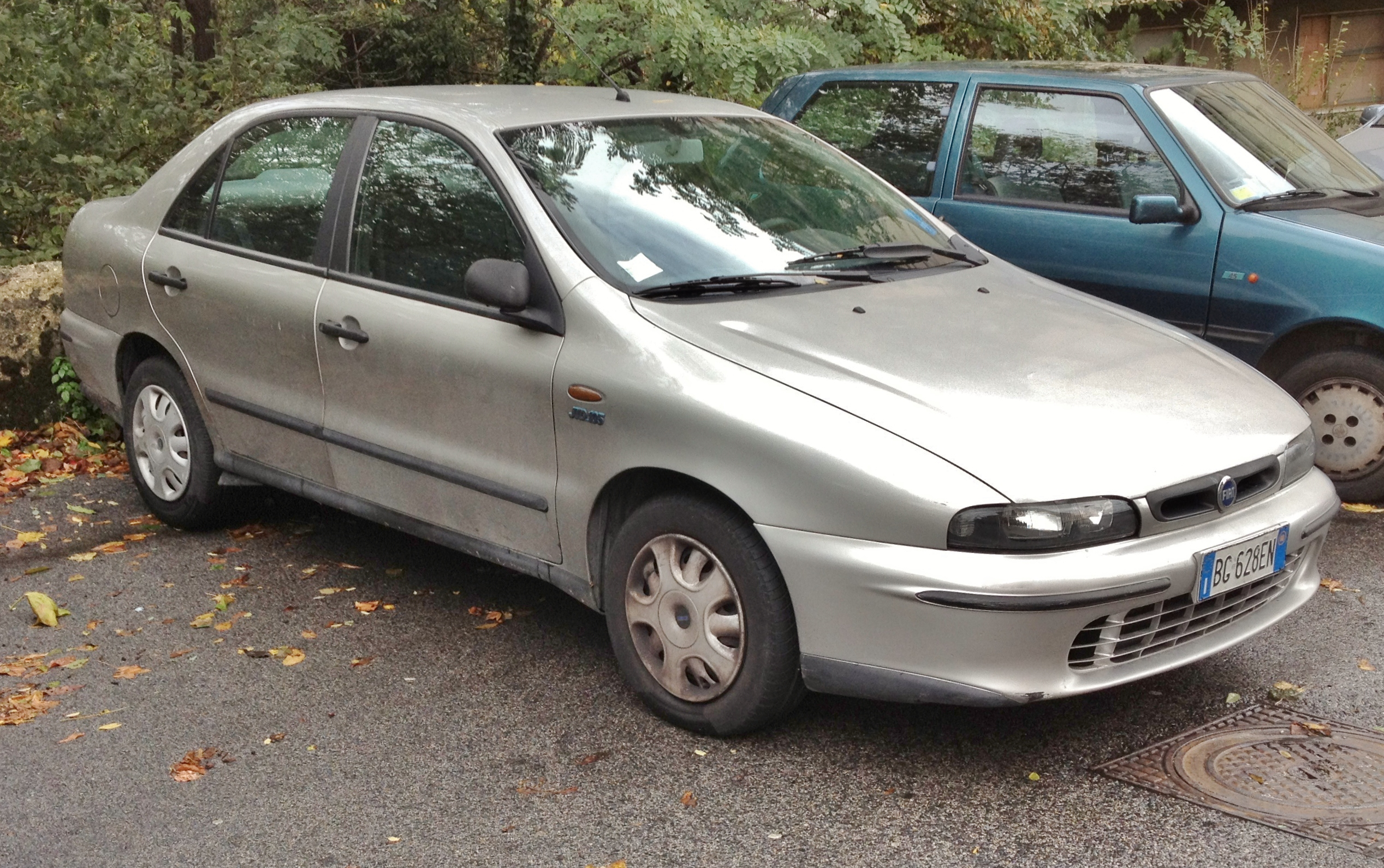 Fiat Marea 1.9 JTD 105 berlina facelift